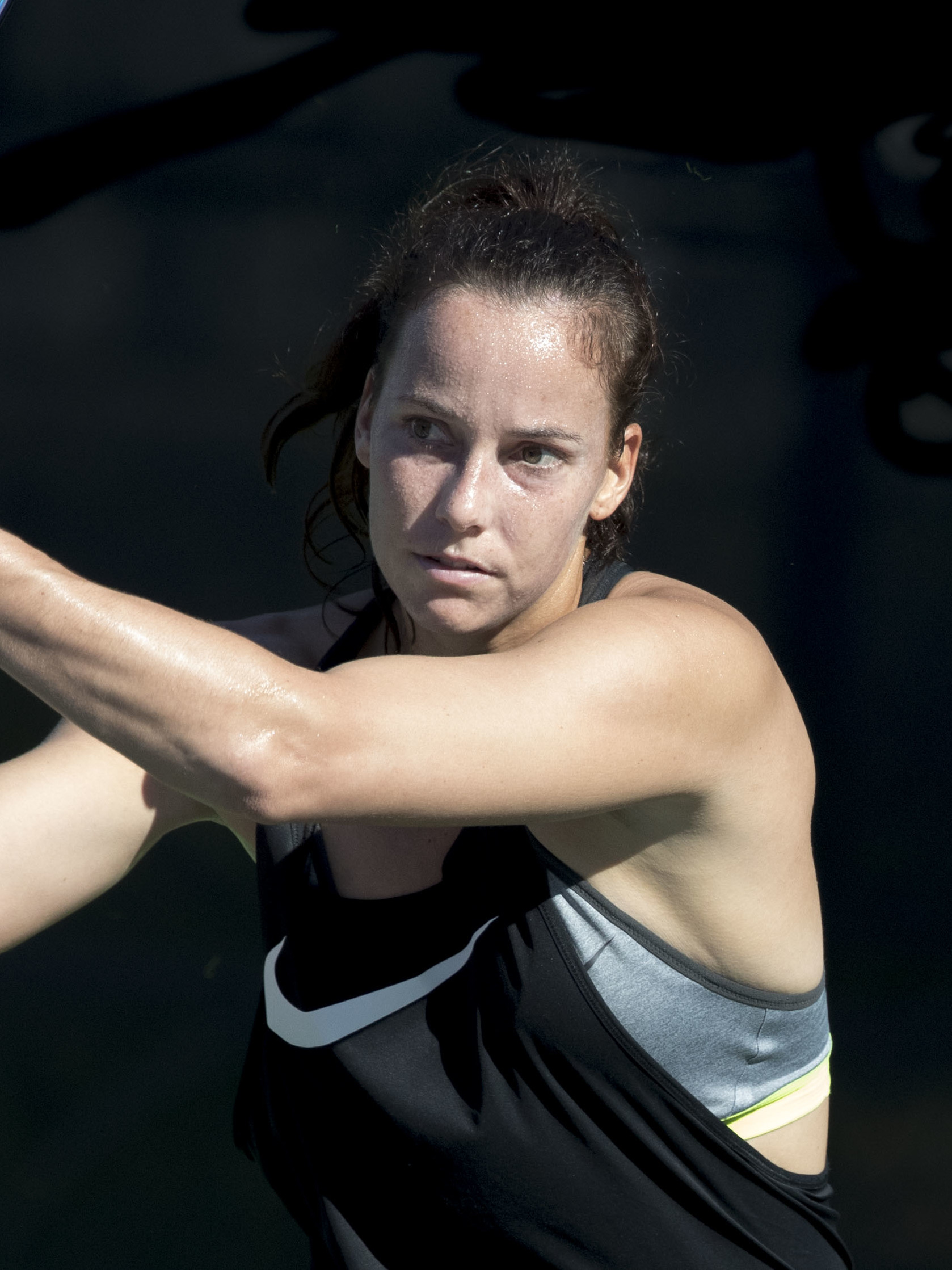 2016 Citi Open